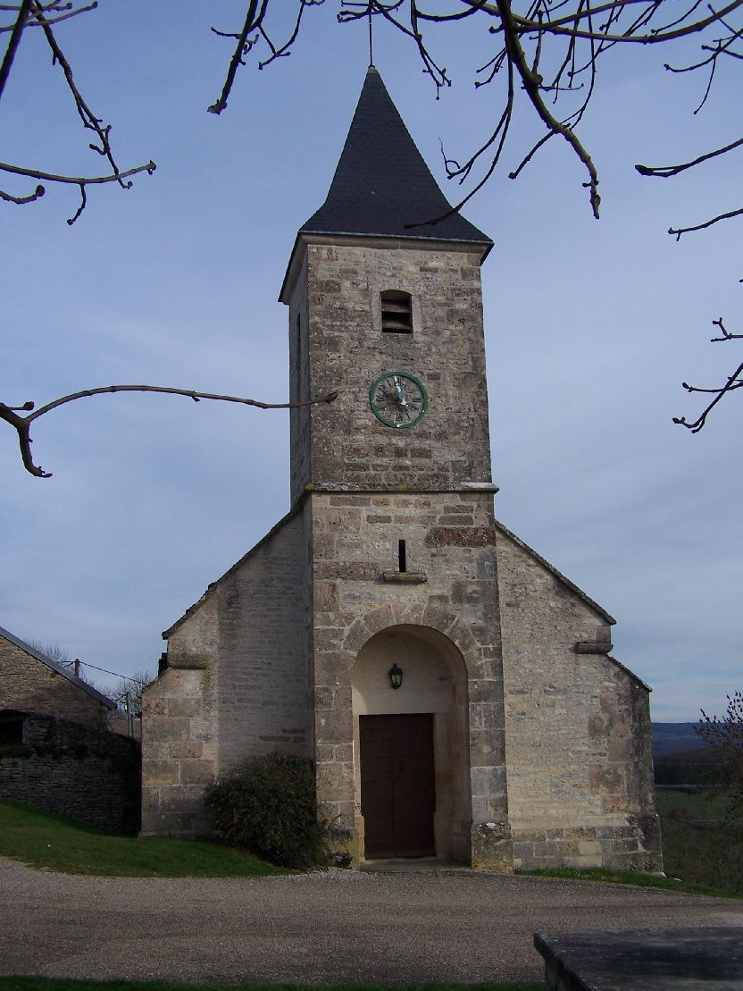 CHAPELLE DE BOUHEY 21